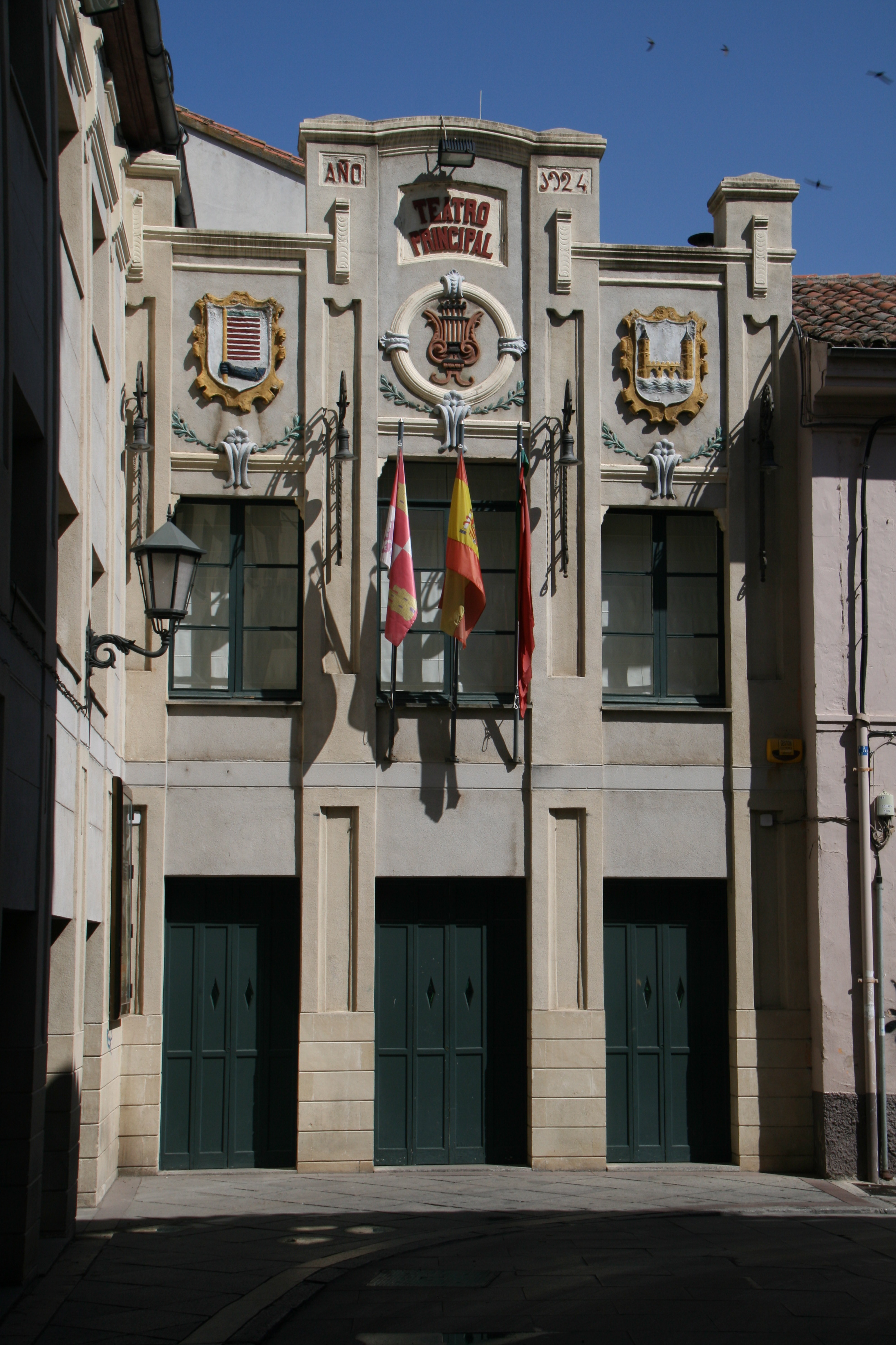 Fachada del Teatro Municipal - Zamora